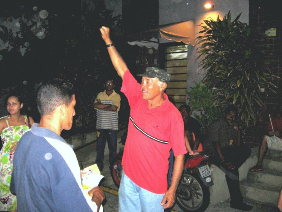 RaimundÃ£o, dirigente sindical da ConstruÃ§Ã£o Civil de Fortaleza, em frente a sede do sindicato da categoria.